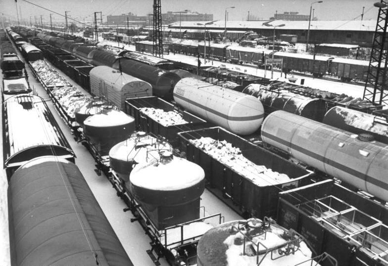 Dresden, Güterbahnhof, Winter ADN-ZB Häßler 24.12.86-na-Dresden: Wetter - Für einen zügigen Verkehr auf dem Güterbahnhof Dresden-Friedrichsdadt unternehmen die Eisenbahner über die Weihnachtsfeiertage alle Anstrengungen. Siehe Motiv 1986-1224-7 N.